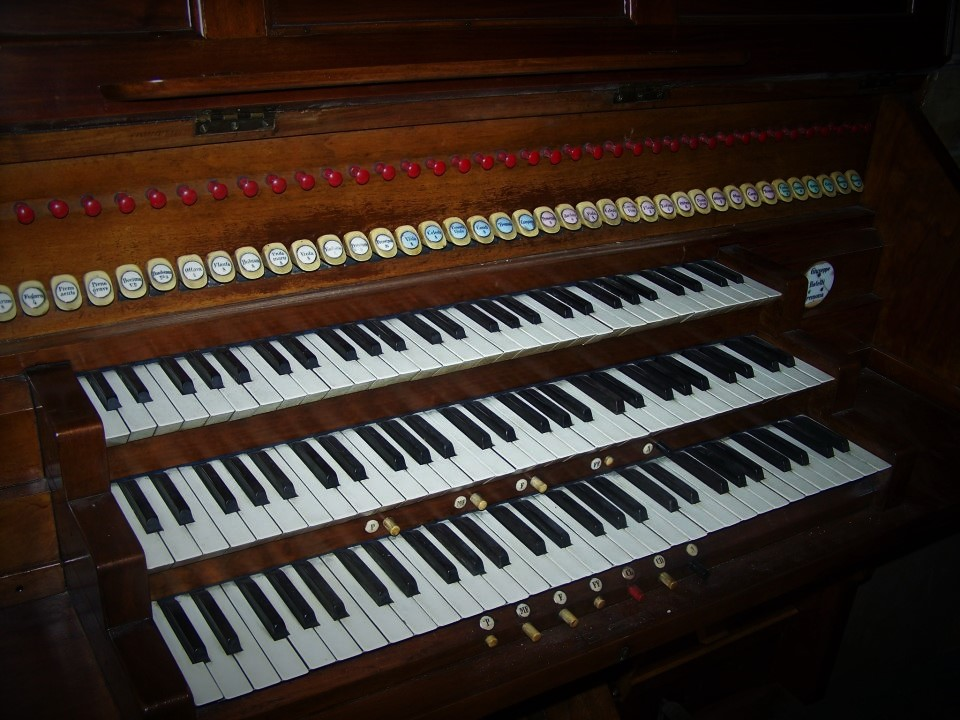 La consolle a tre tastiere ed i registri dell'organo elettro-pneumatico costruito da Giuseppe Rotelli nel 1922